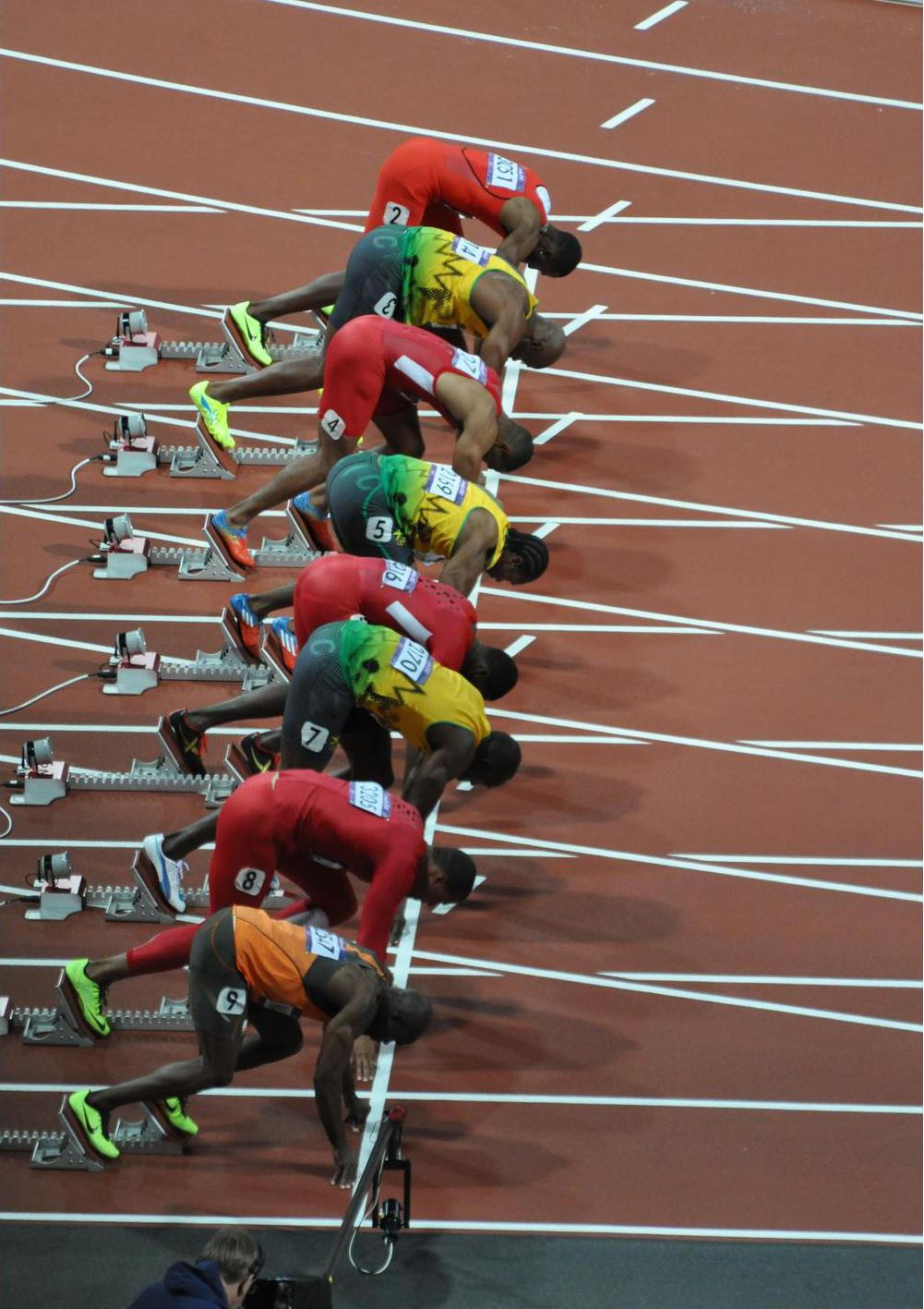 On your marks